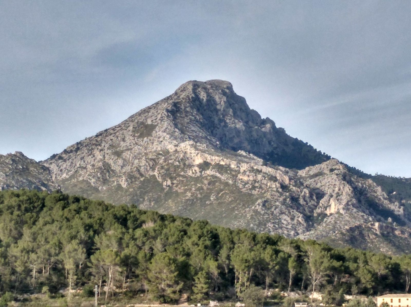 Vista del Puig de Galatzó, Mallorca.